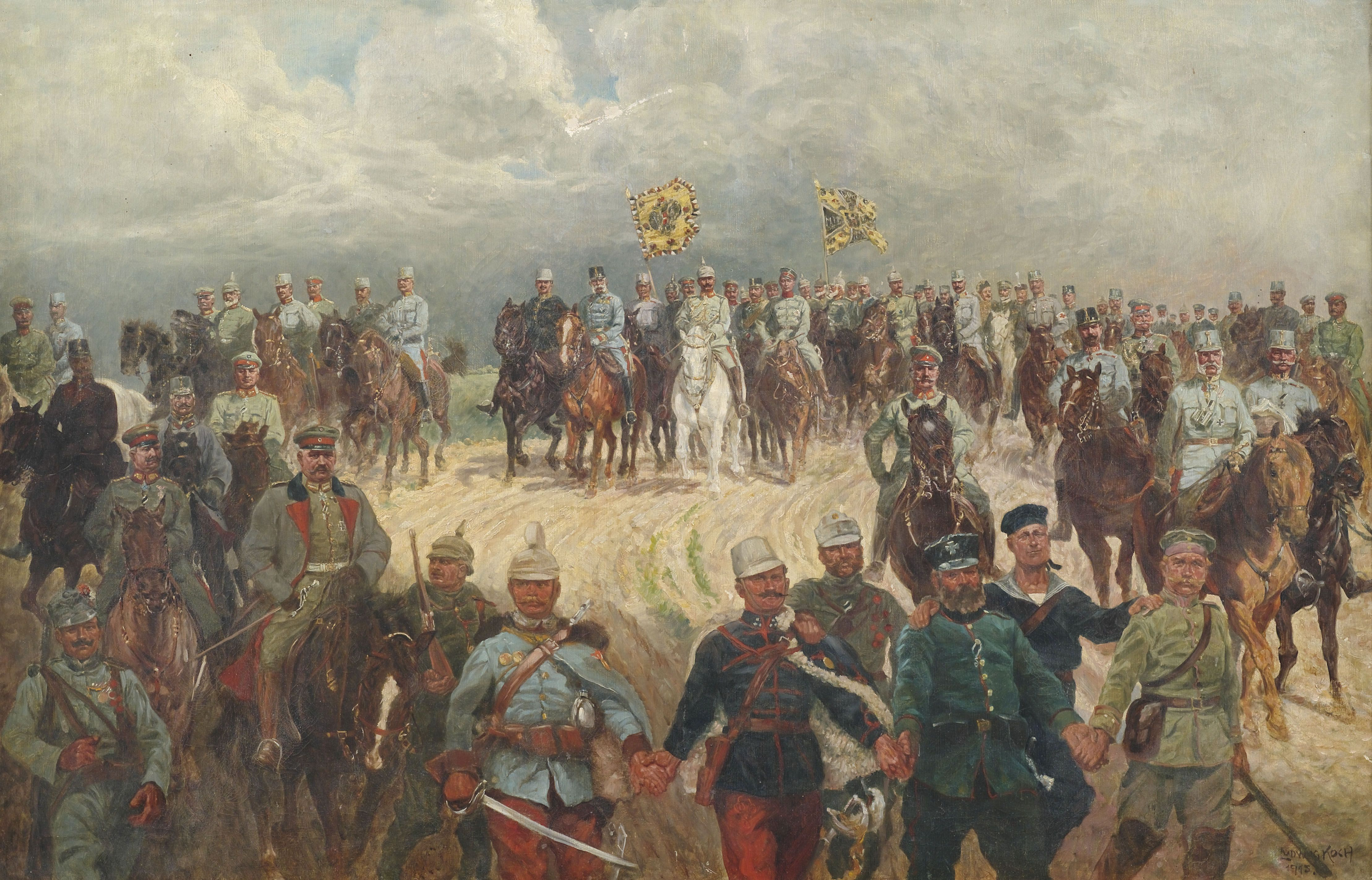 Franz Joseph, Wilhelm II. und andere deutsche Regenten, deutsche und österreichische Generale und – symbolisch - einzelne Truppenteile